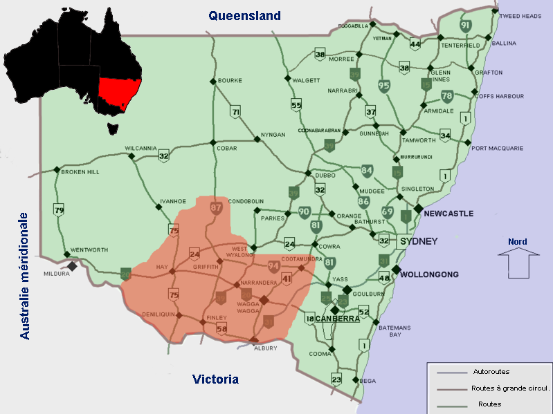 Carte de la Riverina